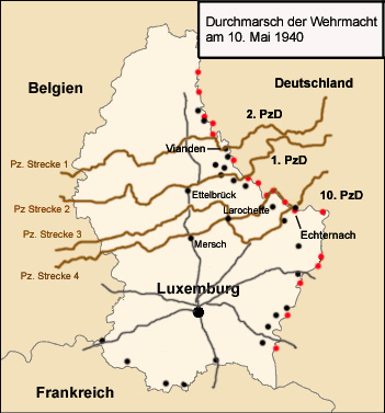 Bildquelle Karte: Weitere Quelle: Lesebuch zur Ausstellung "Fragen an die Geschichte Luxemburgs im Zweiten Weltkrieg" 2002. Seite 34